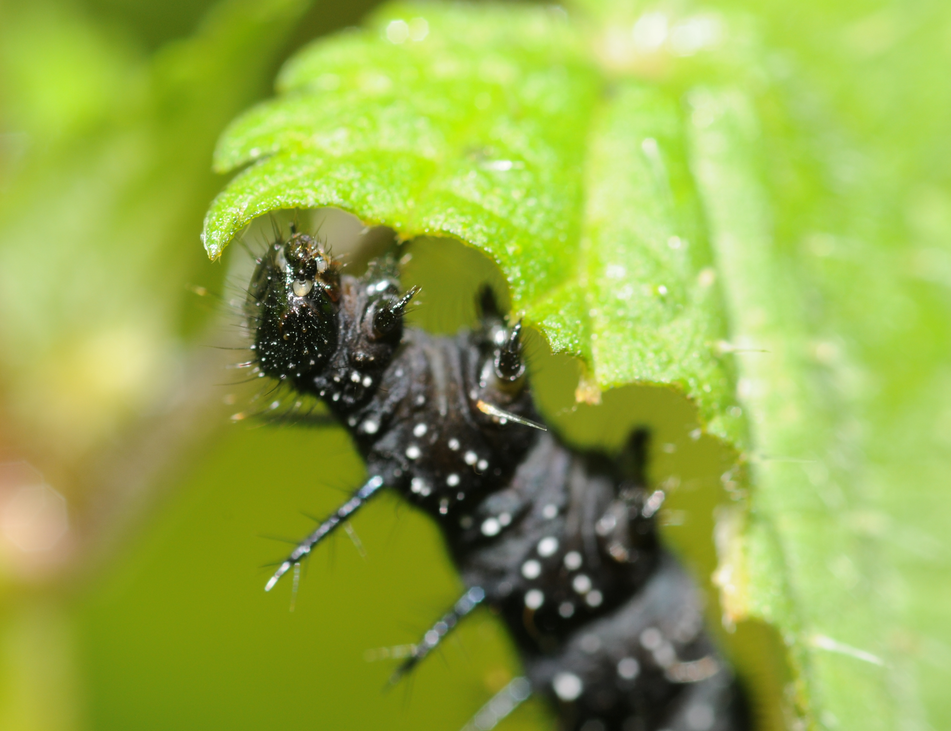 Chenille de Paon-du-jour (Inachis io) mangeant une feuille d'ortie.